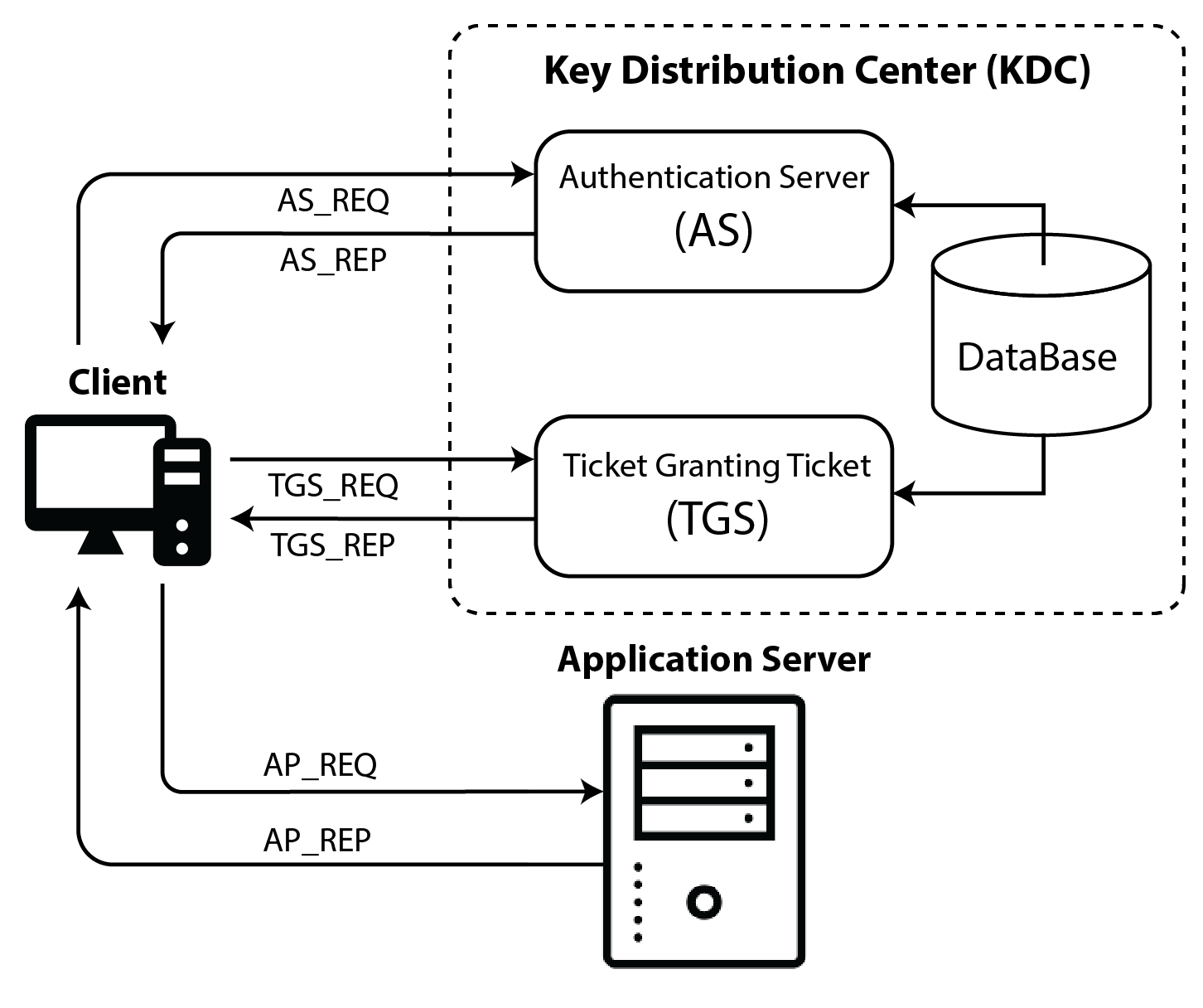 תרשים כללי של פרוטוקול קרברוס